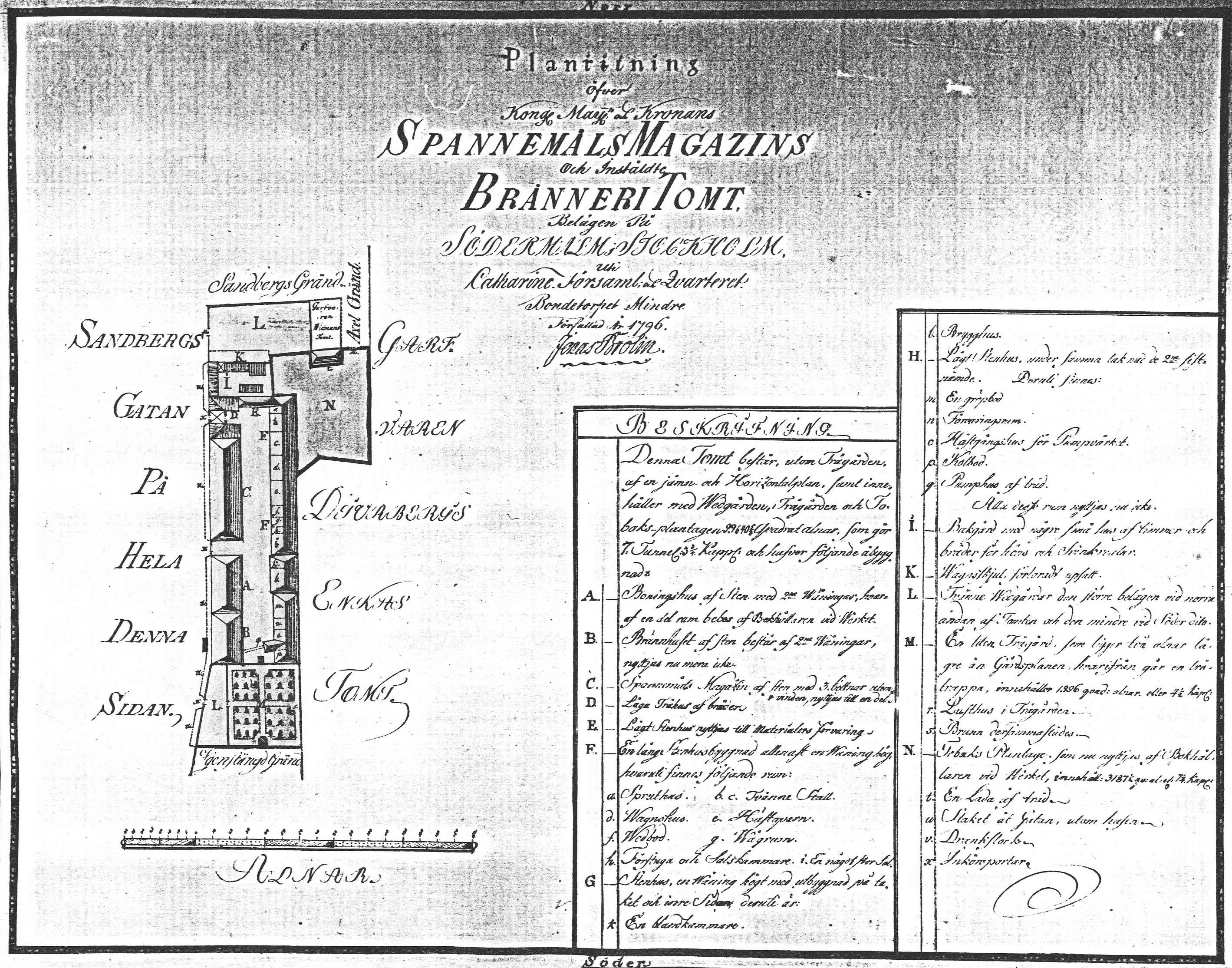 Karta över Kronobränneriet på Södermalm